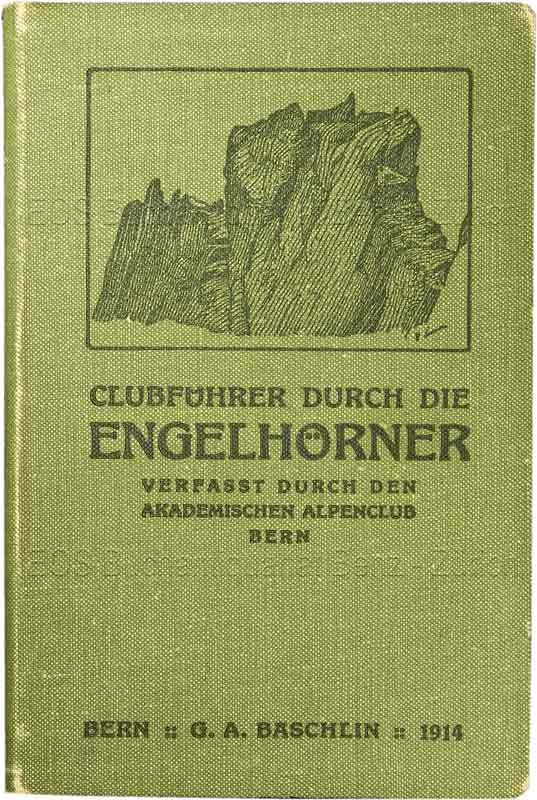 Engelhornführer des Akamdemischen Alpenclubs Bern, Schweiz